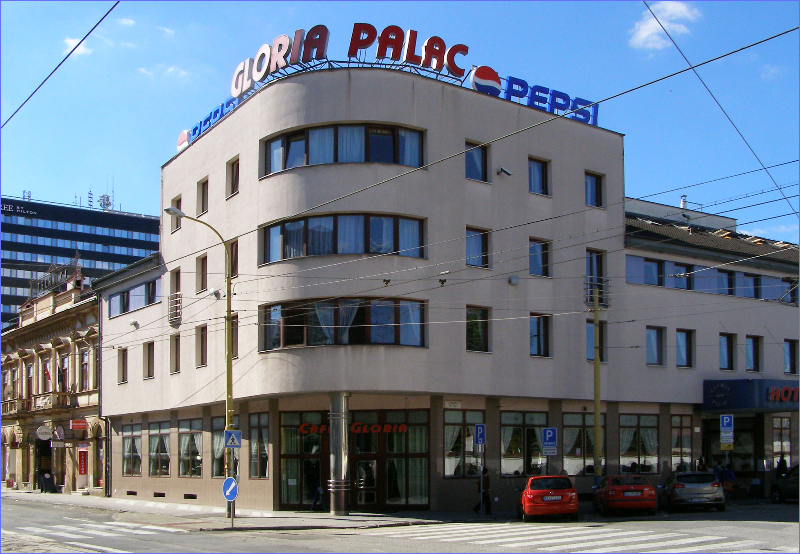 Hotel Gloria Palac